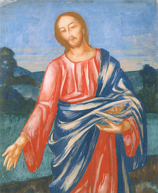 К. П. Петров-Водкин. Эскиз к мозаике "Христос-Сеятель"